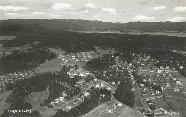 Sogn haveby; flyfoto 1935 av Karl Harstad